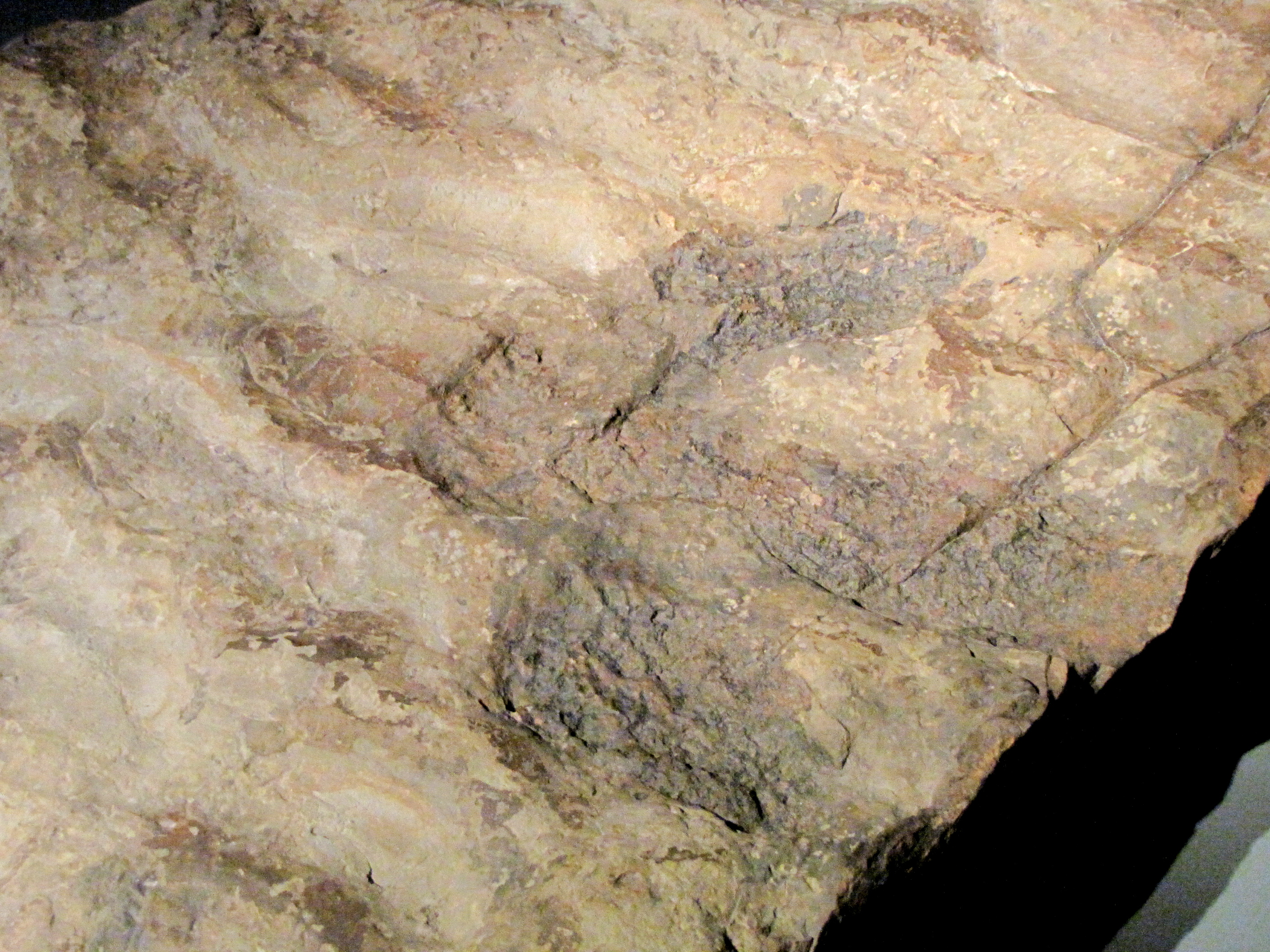 Gasometer Oberhausen. Ausstellung "Magische Orte", 2011. Spur des Iguanodon, Rehburger Berge bei Münchehagen (Niedersachsen). 140 Millionen Jahre vor Christus (Kreide). Niedersächsisches Landesmuseum Hannover.